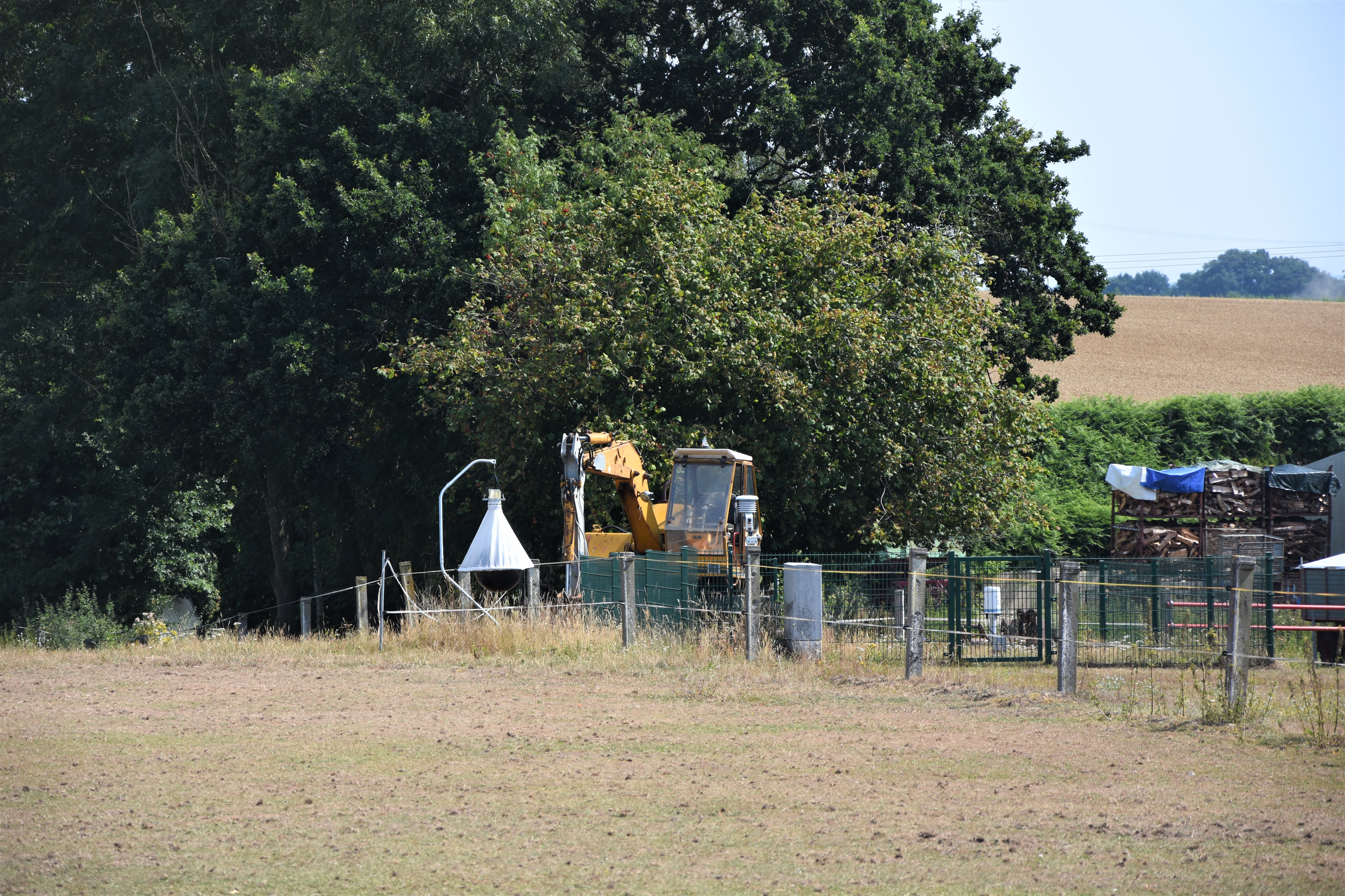 Wetterstation in Alfhausen. Wenige Stunden nach Erstellung des Fotos wurde die höchste bislang an der Wetterstation ermittelte Temperatur gemessen (39,2°C).